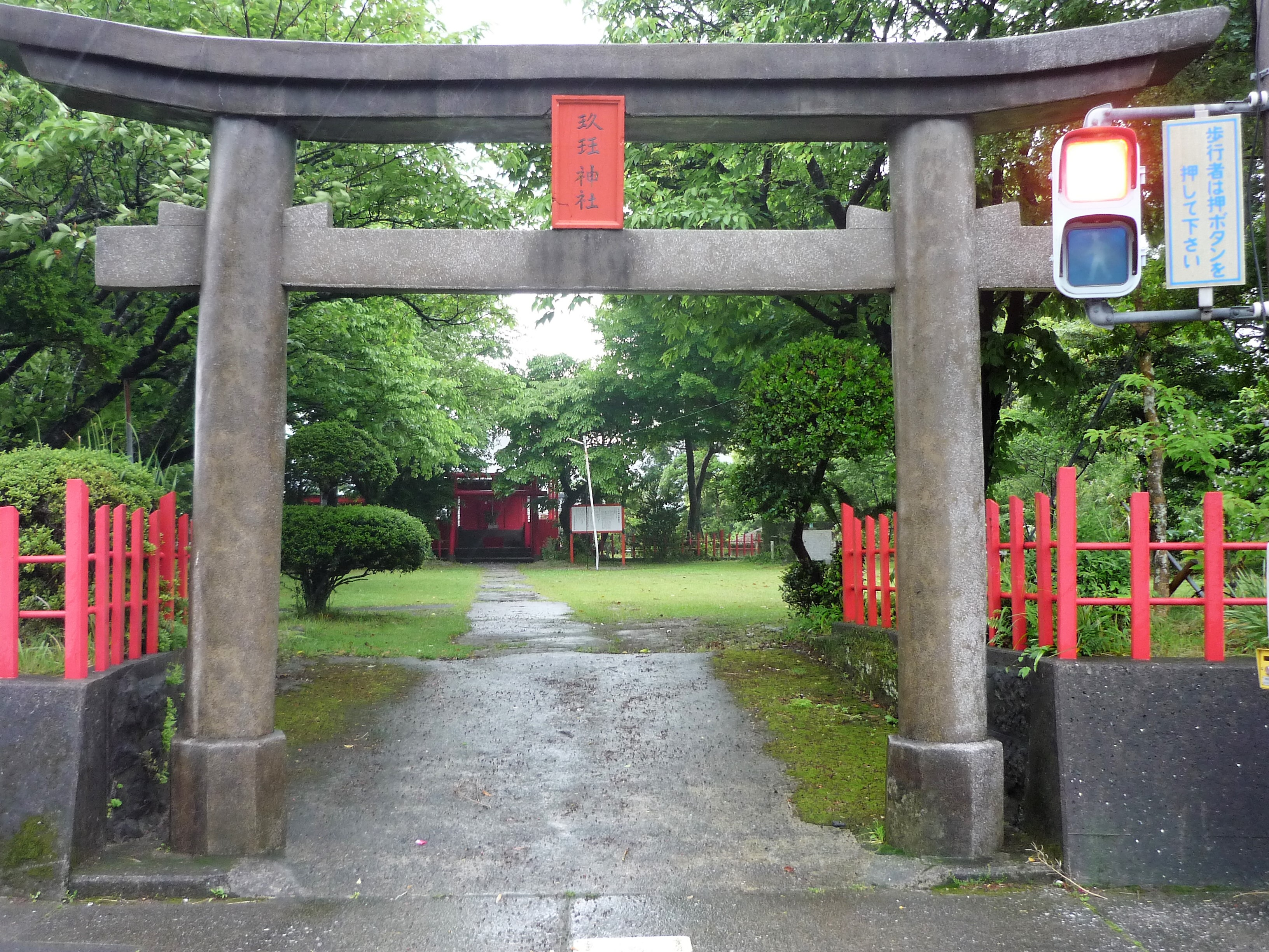 玖玉神社（指宿市池田） Panasonic Lumix DMC-FS3